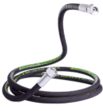 Bild på högtrycksslang.